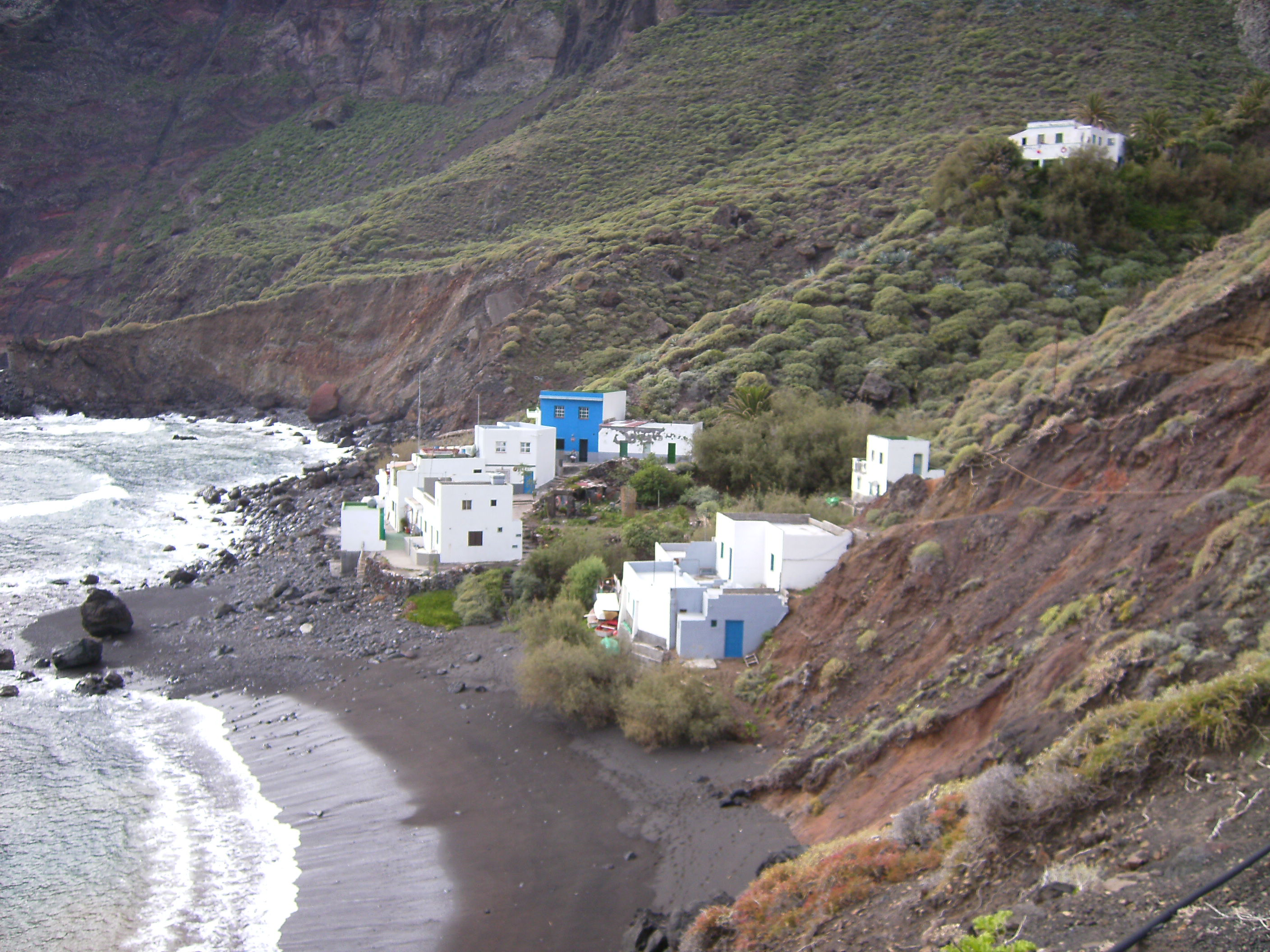 Vista del caserío de Roque Bermejo, Anaga (Santa Cruz de Tenerife)